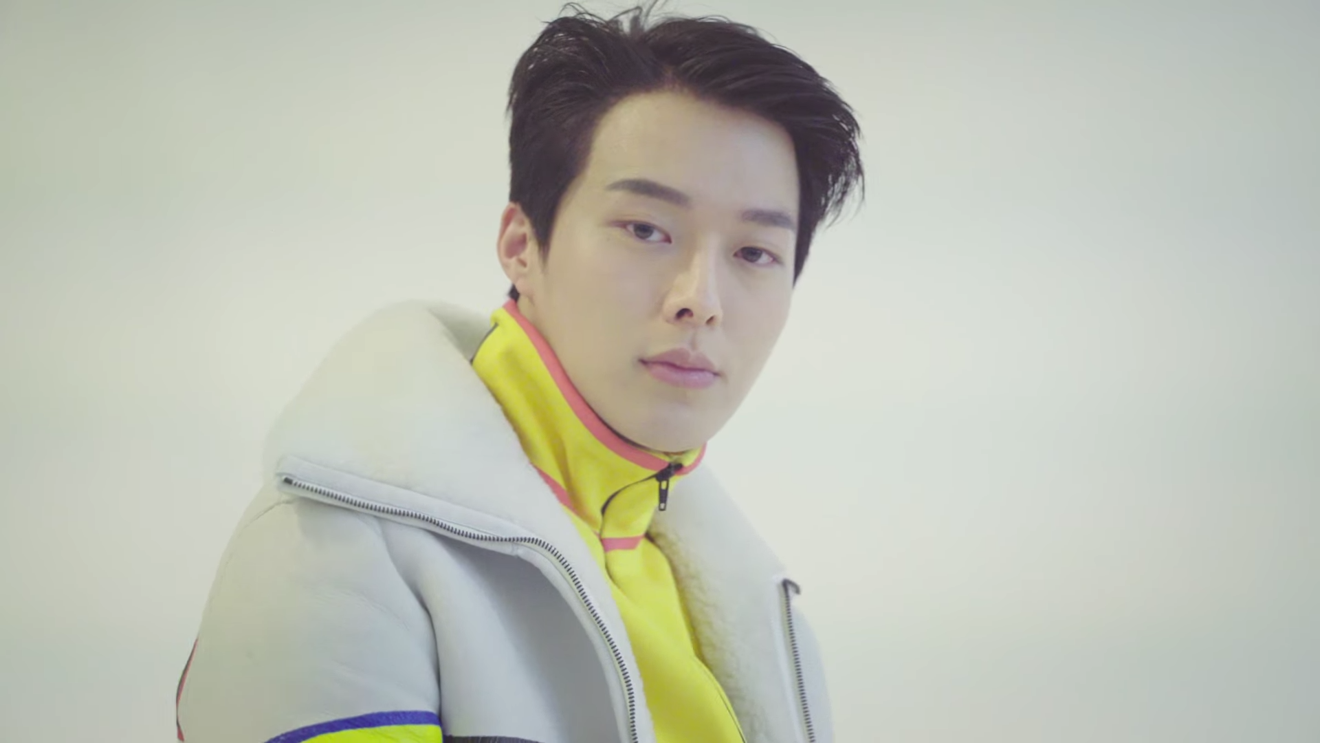 장기용의 정공법